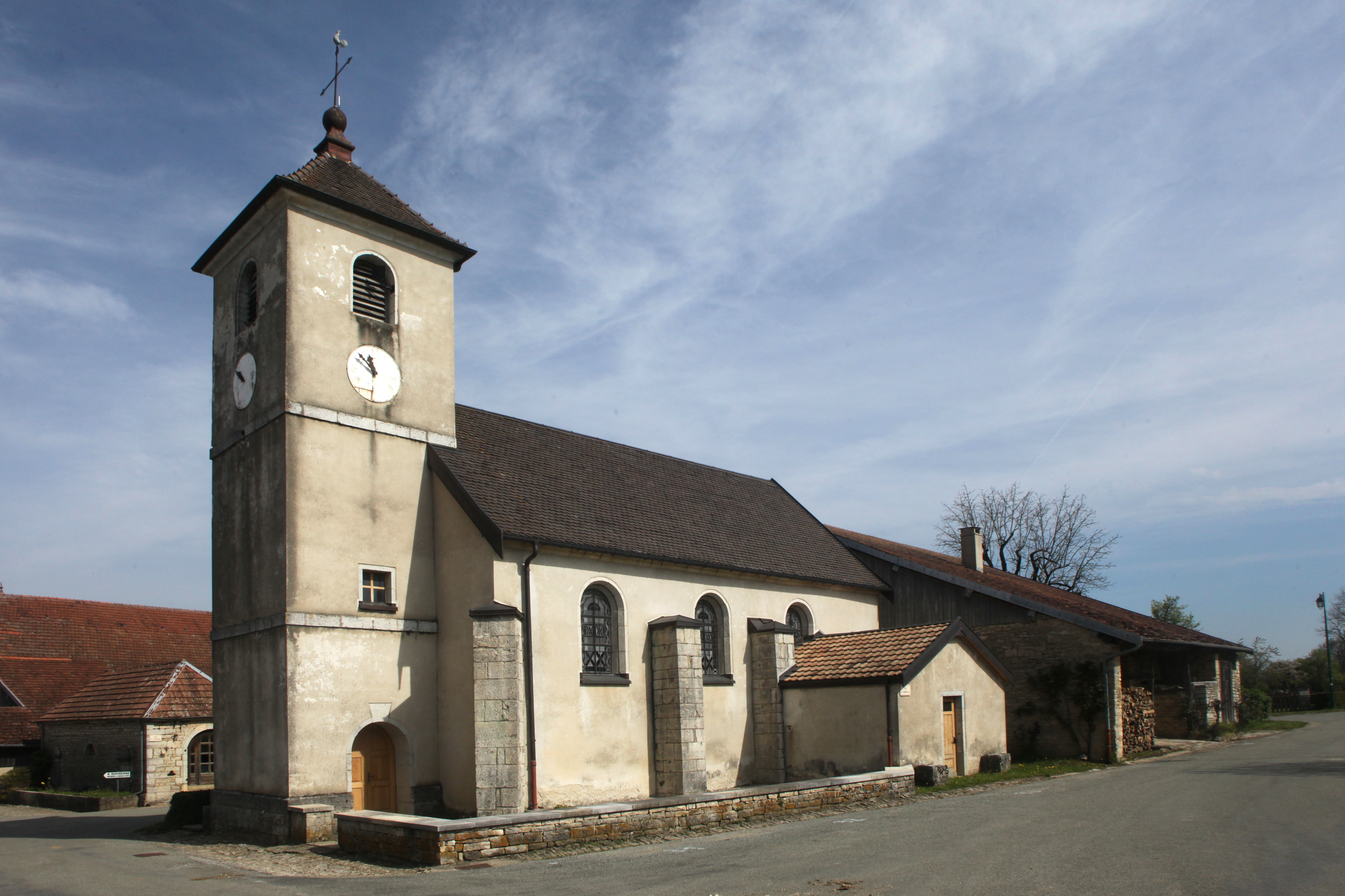 Église de Flagey (Doubs).